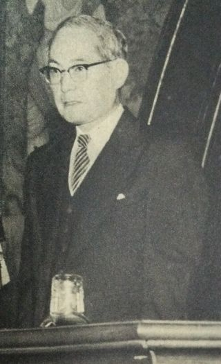 矢内原忠雄（1956年度東京大学入学式にて）